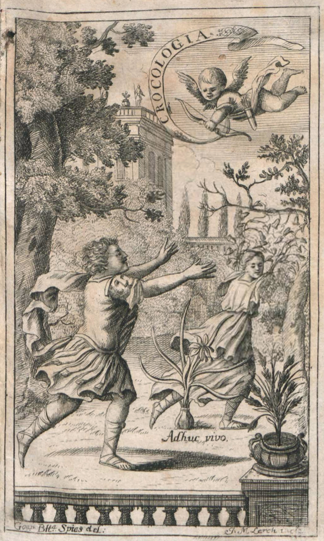 Titelkupfer